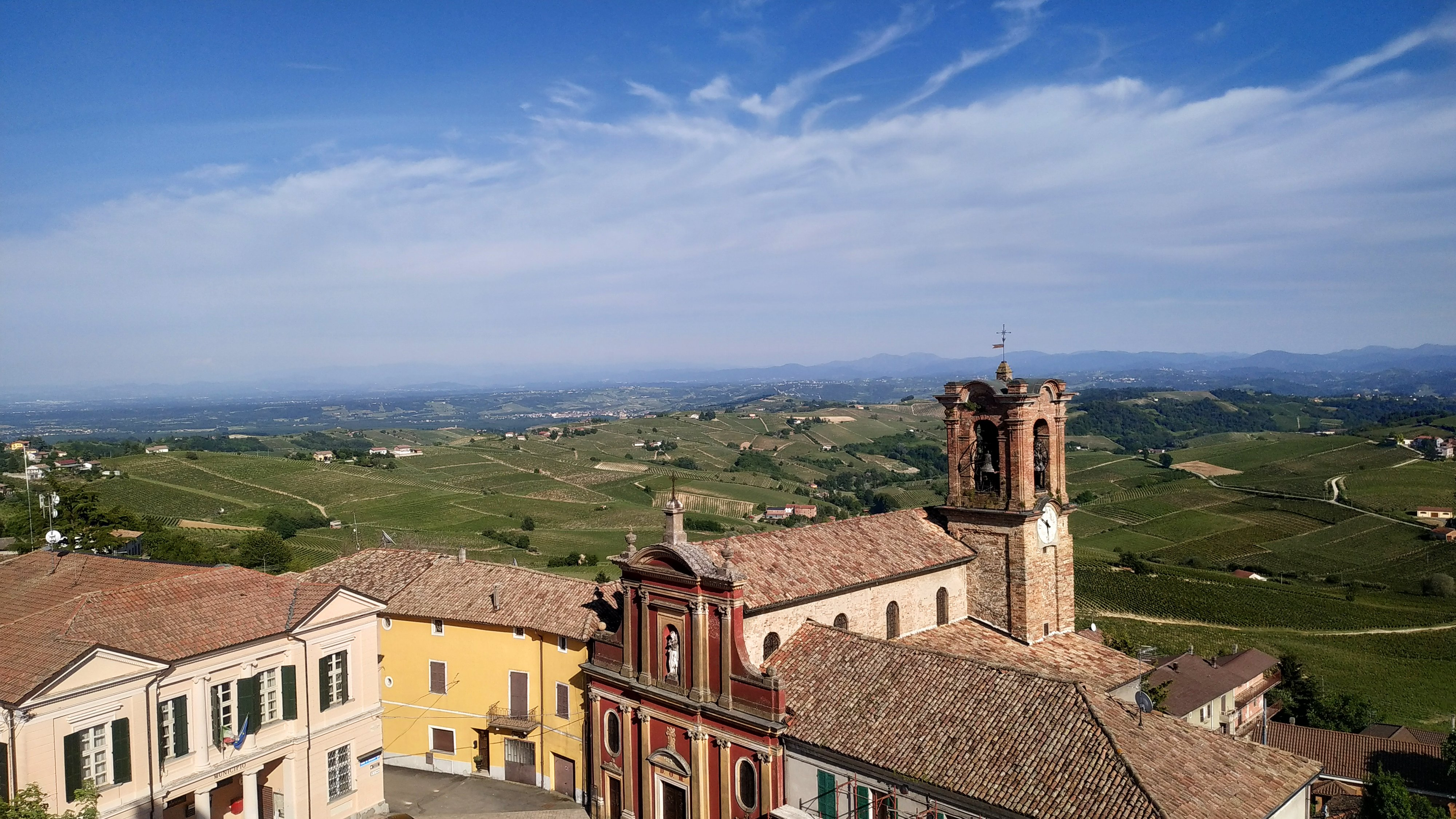 panorama sul Monferrato dal belvedere di Alice Bel Colle